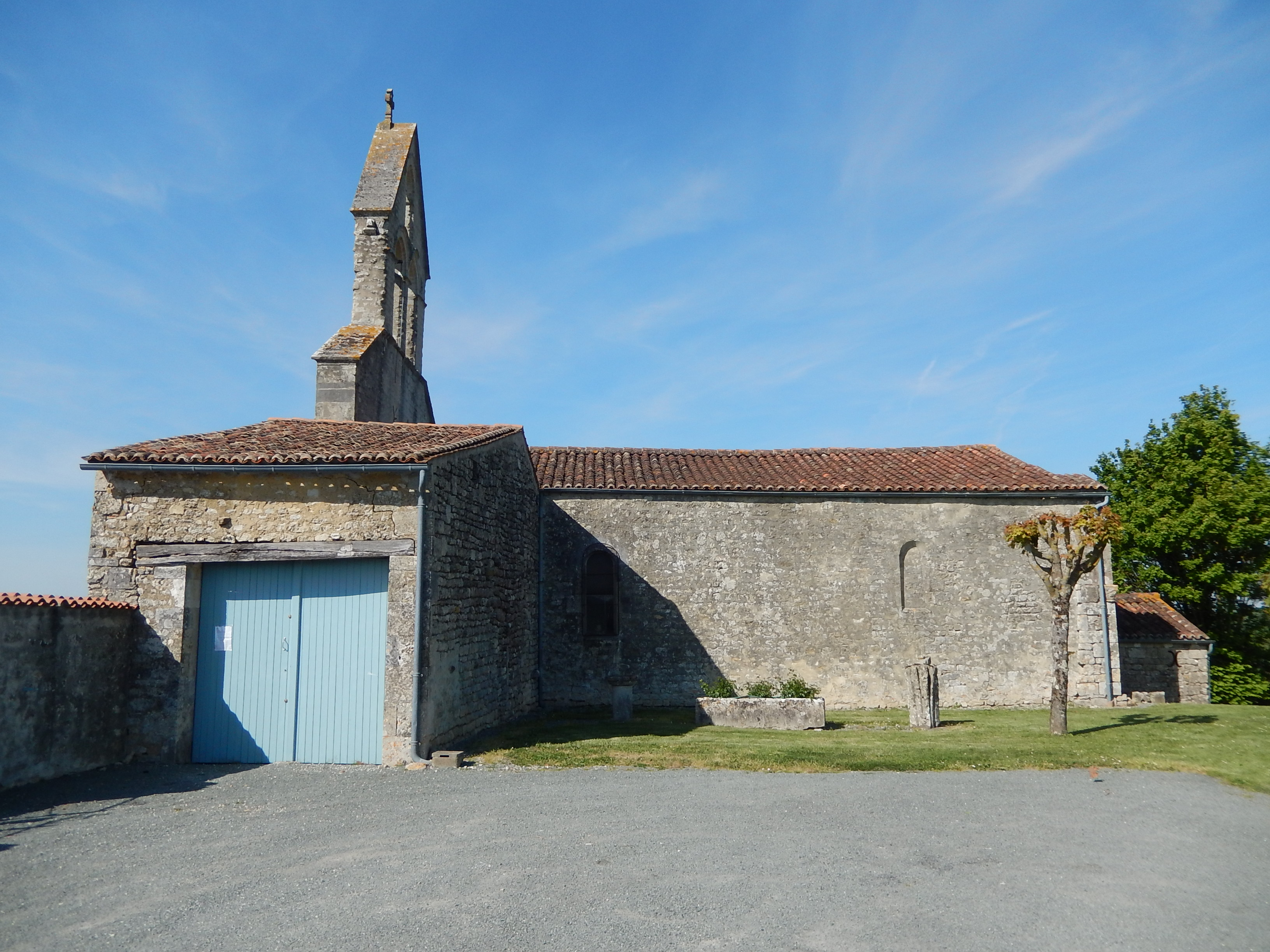 L'église Saint Martial de Saint-Martial (Charente-Maritime, France) vue par sa façade sud.